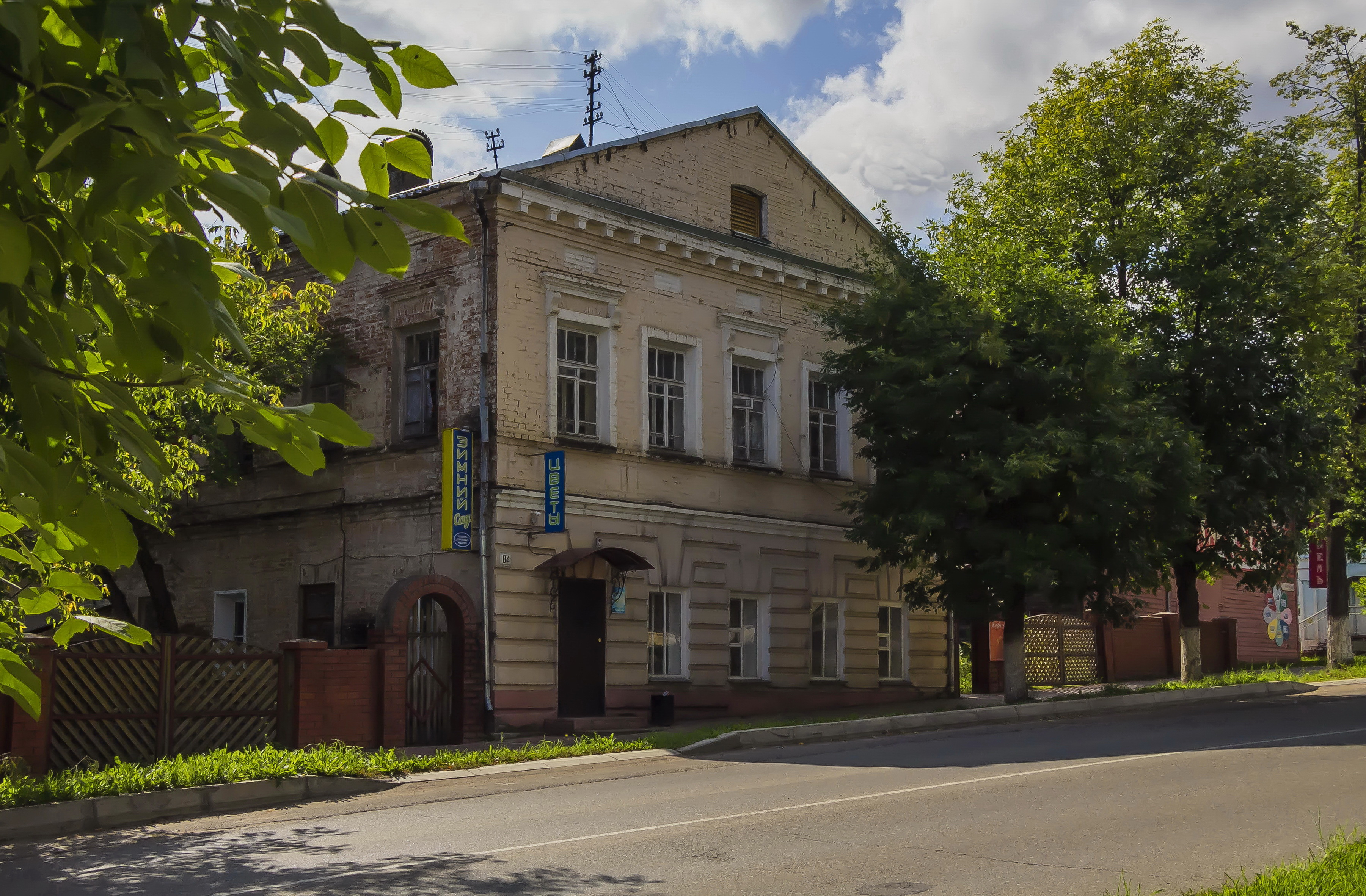 Дом жилой: улица Советская, 84, Котельнич, Кировская область